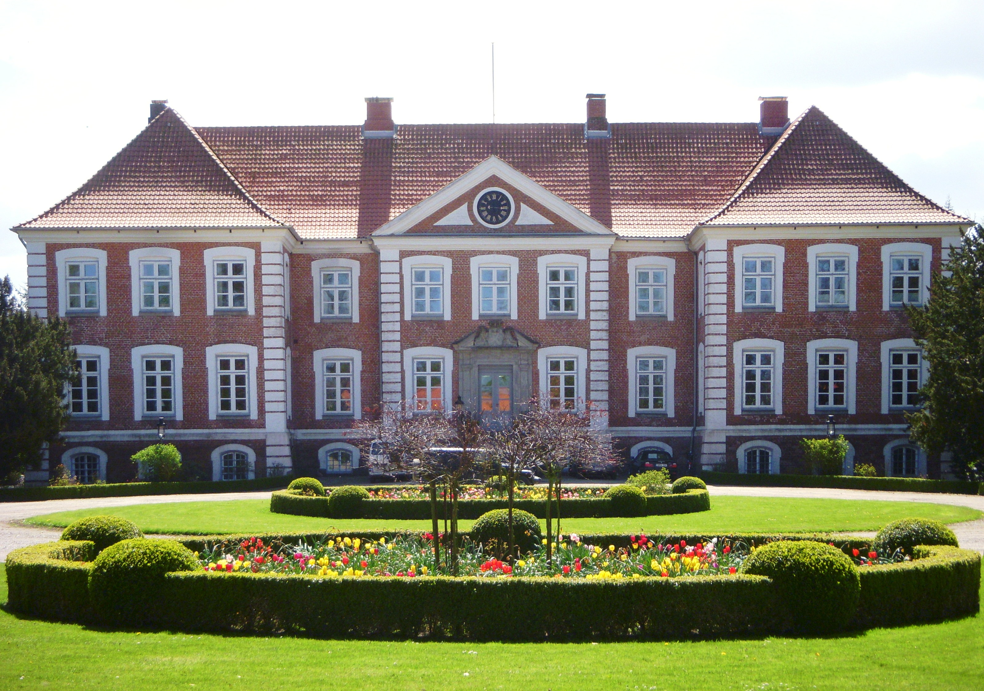 Güldenstein Hauptgebäude